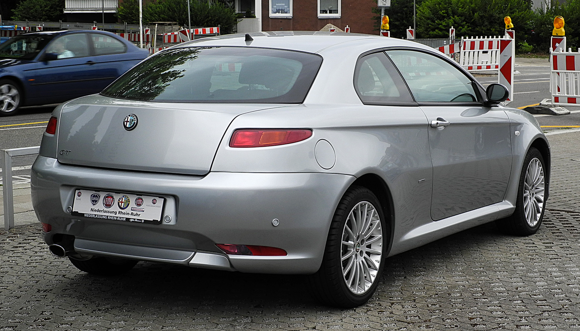 Alfa Romeo GT 1.8 TS 16V Progression